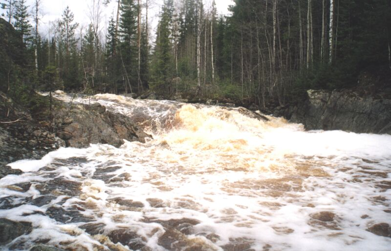 Дюгакоски